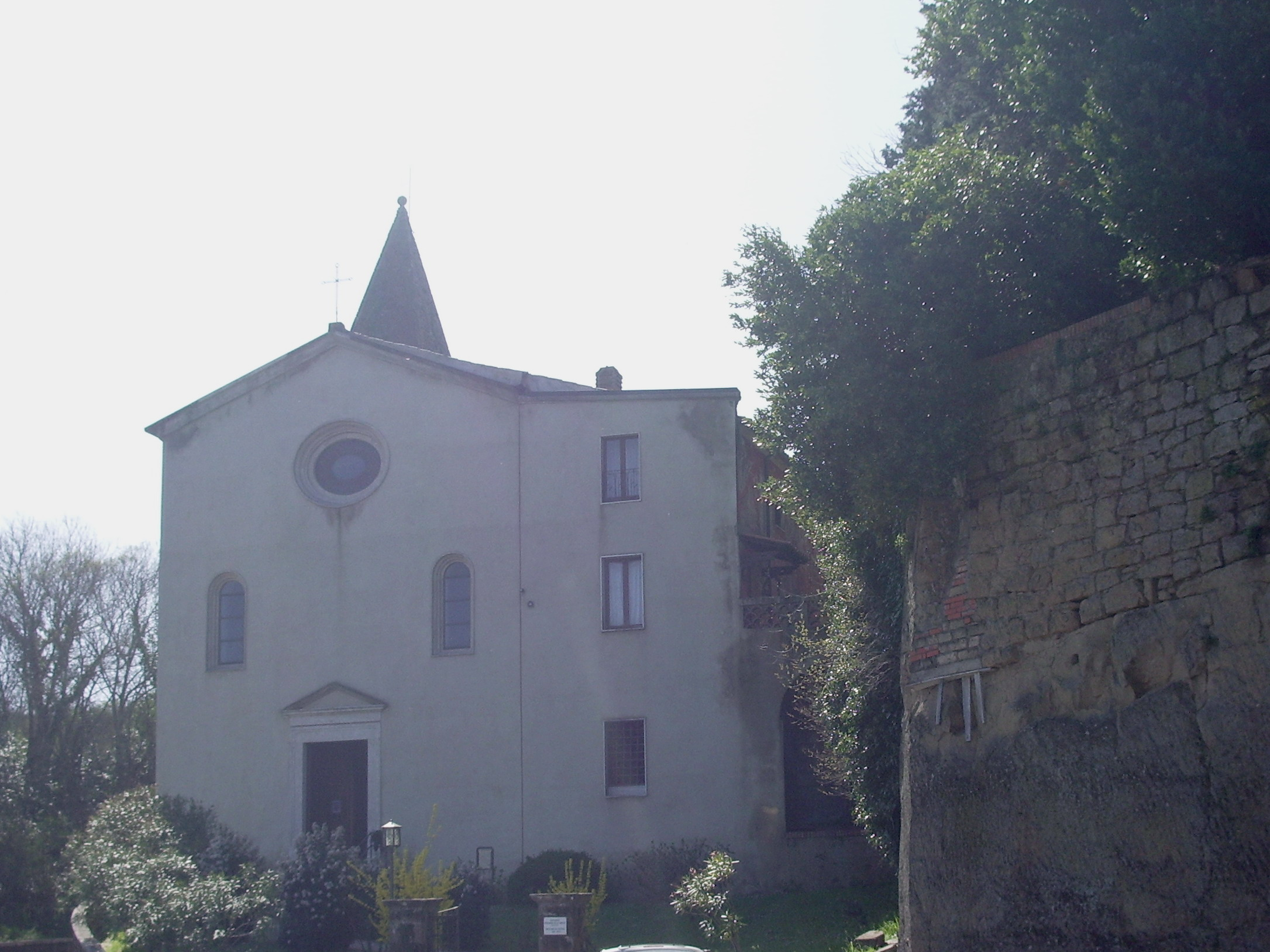 Il Santuario della Madonna delle Grazie a Pitigliano